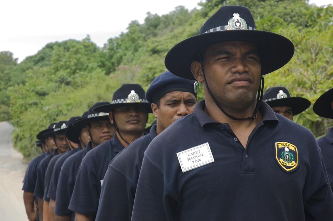 Nauru cadet police on training exercise.